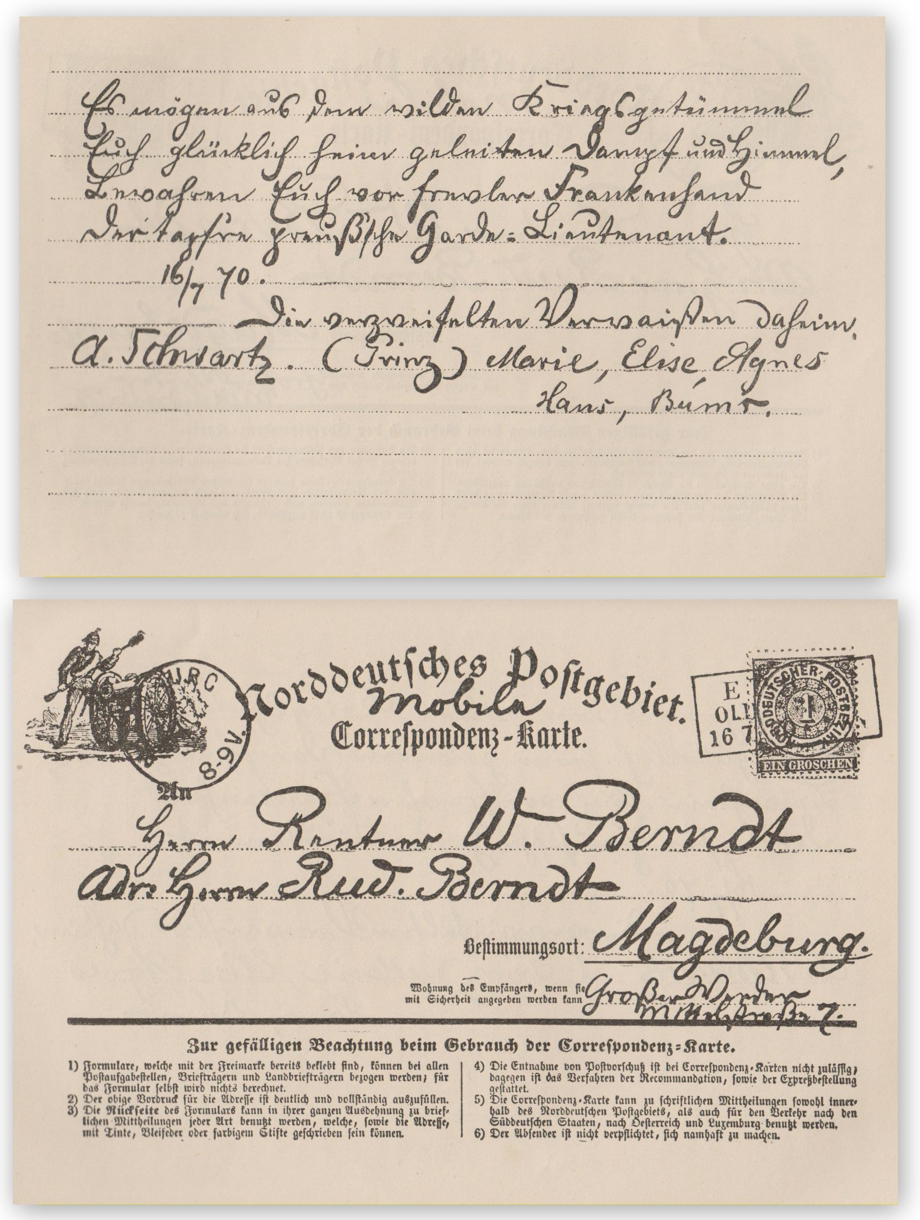 Einer der ersten Bildpostkarten, gedruckt und verschickt von Buchhändler August Schwartz (1837-1904) aus Oldenburg TEXT Es mögen aus dem wilden Kriegsgetümmel Euch glücklich heim geleiten Dangt [??] und Himmel, Bewahren Euch vor [???] Frankenland [???] [???] Garde-Lieutnant 16/7 70 ...